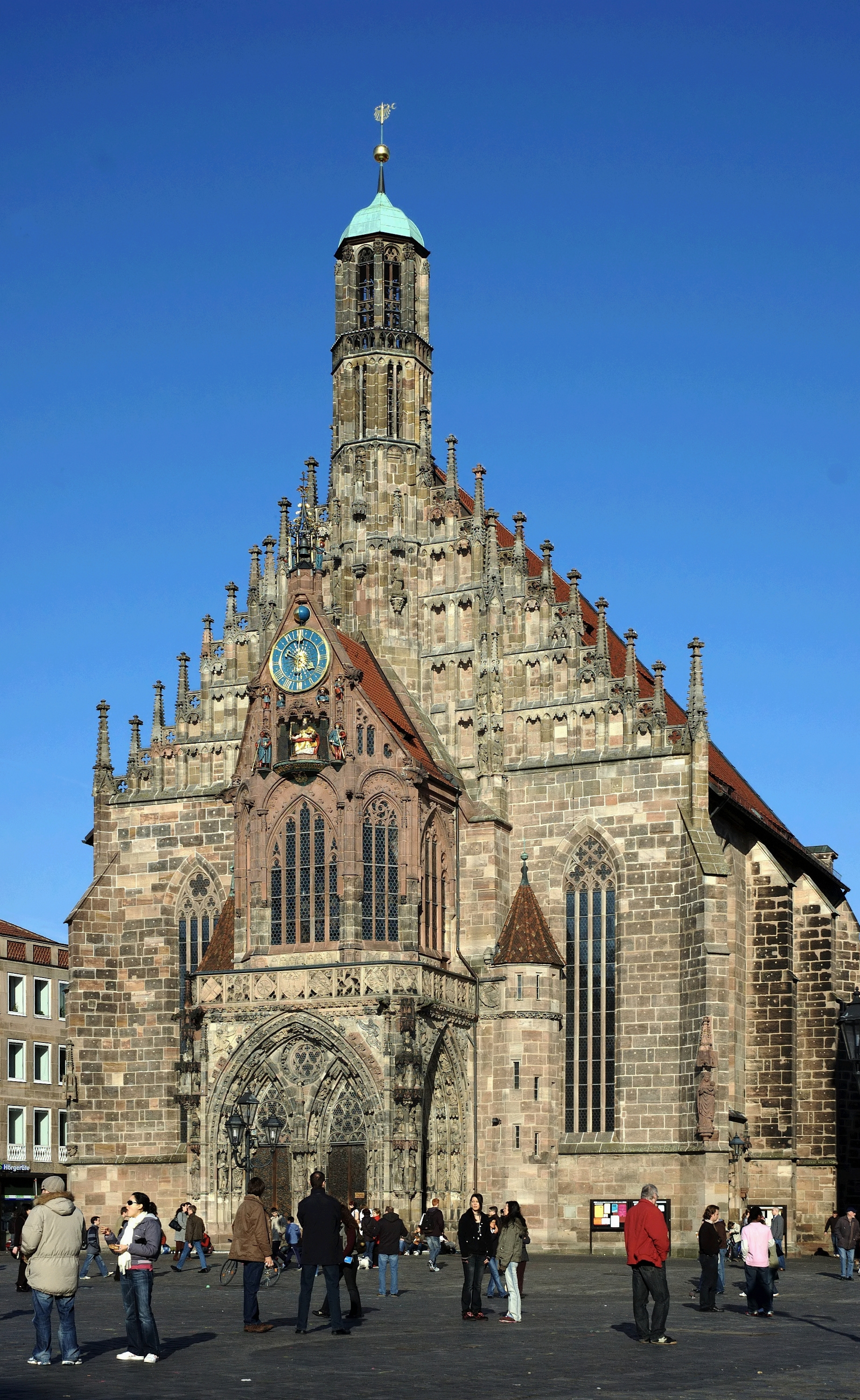 Frauenkirche in Nuremberg (Germany)